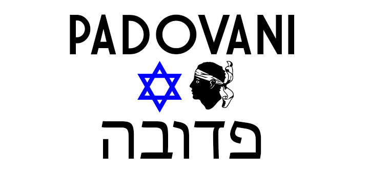 Corsu: Casata Padovani